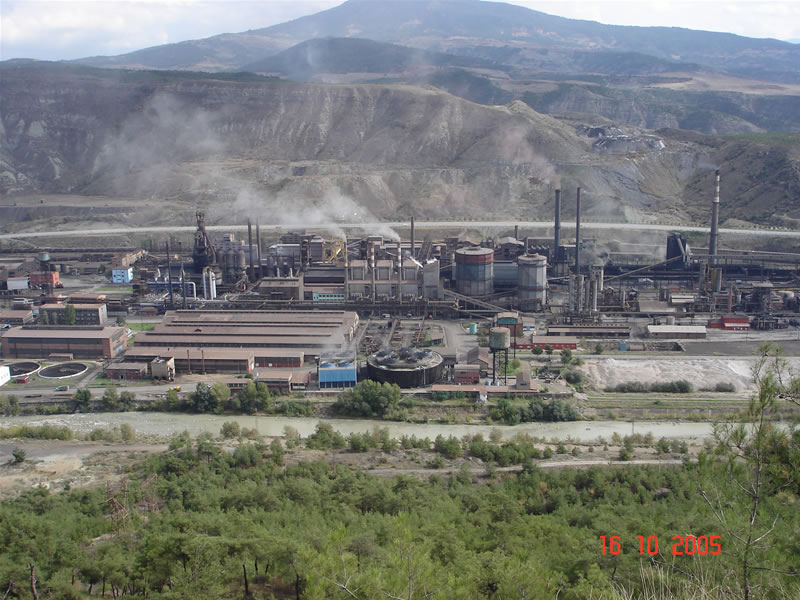 karabüğün il olmasında en etkili etken kardemir a.ş